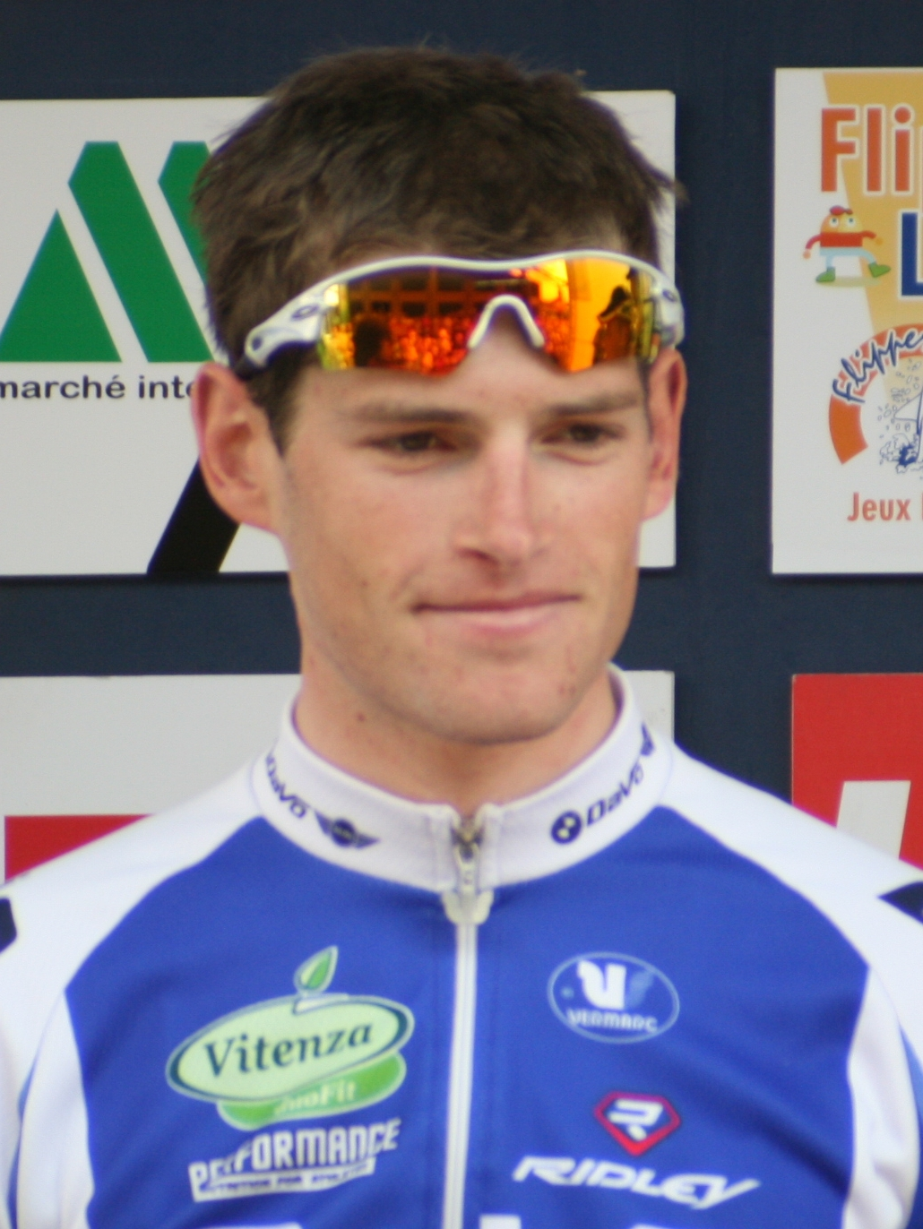 Ben Hermans, aux championnats de Belgique du contre-la-montre à Mouscron